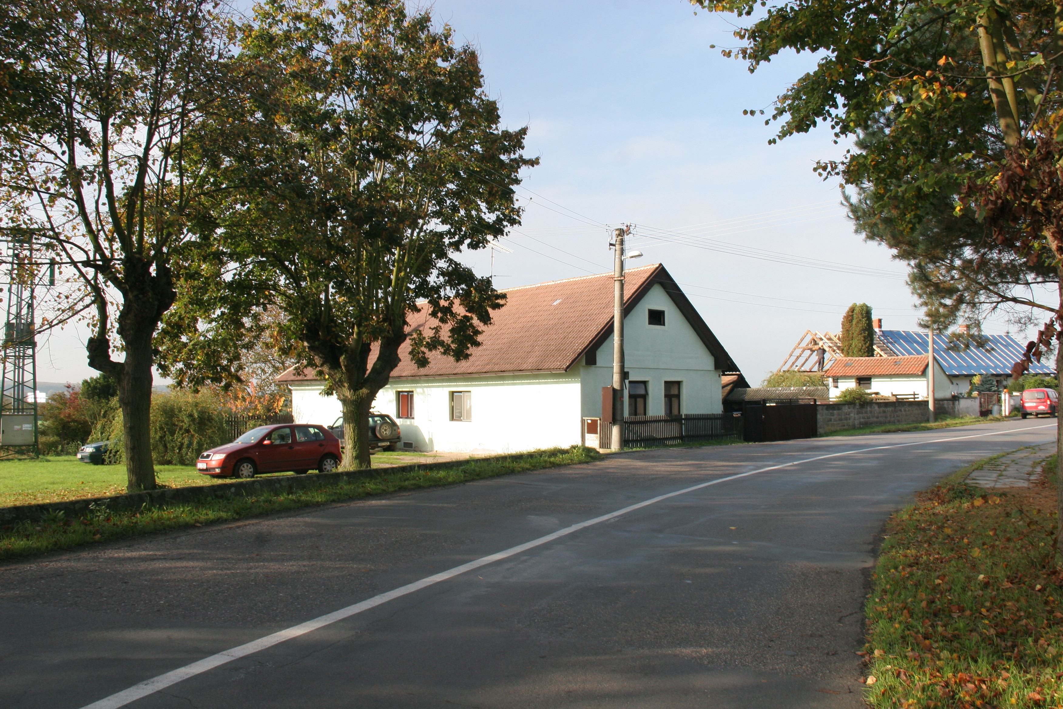 Levín 8